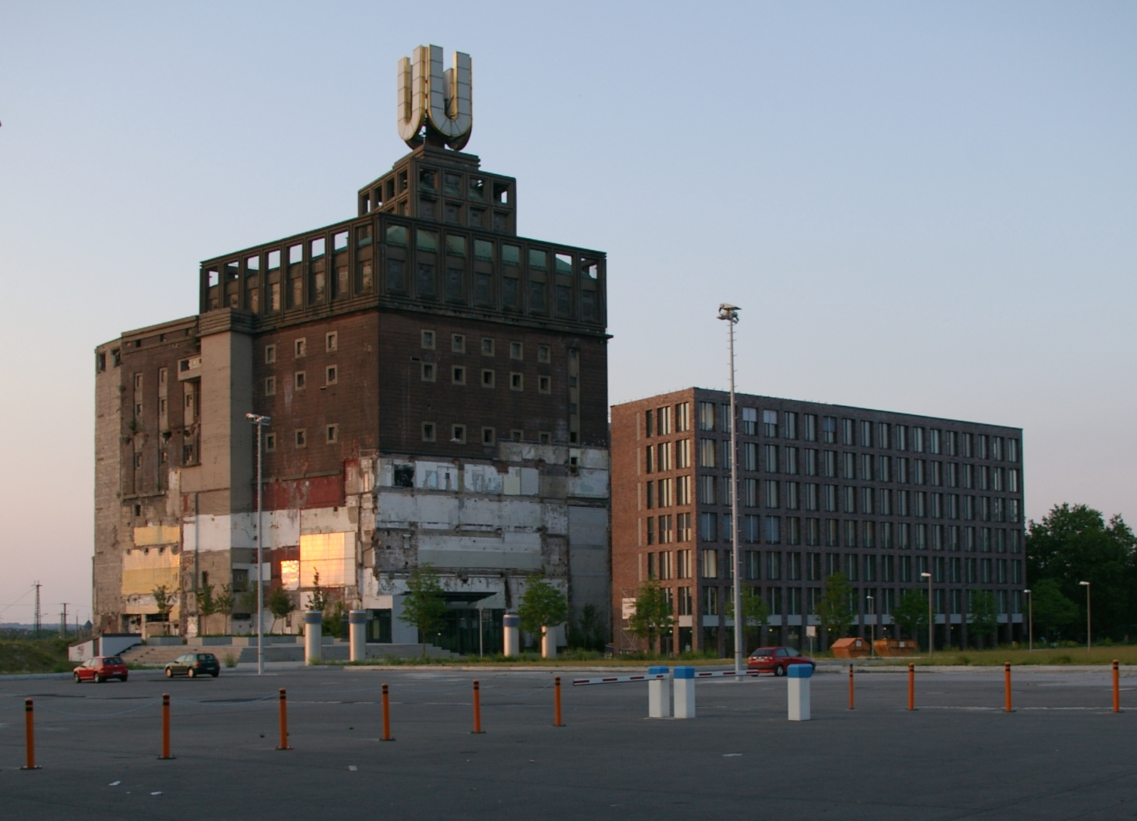 Unionbrauerei, Bauzustand 2007, Dortmund, Nordrhein-Westfalen